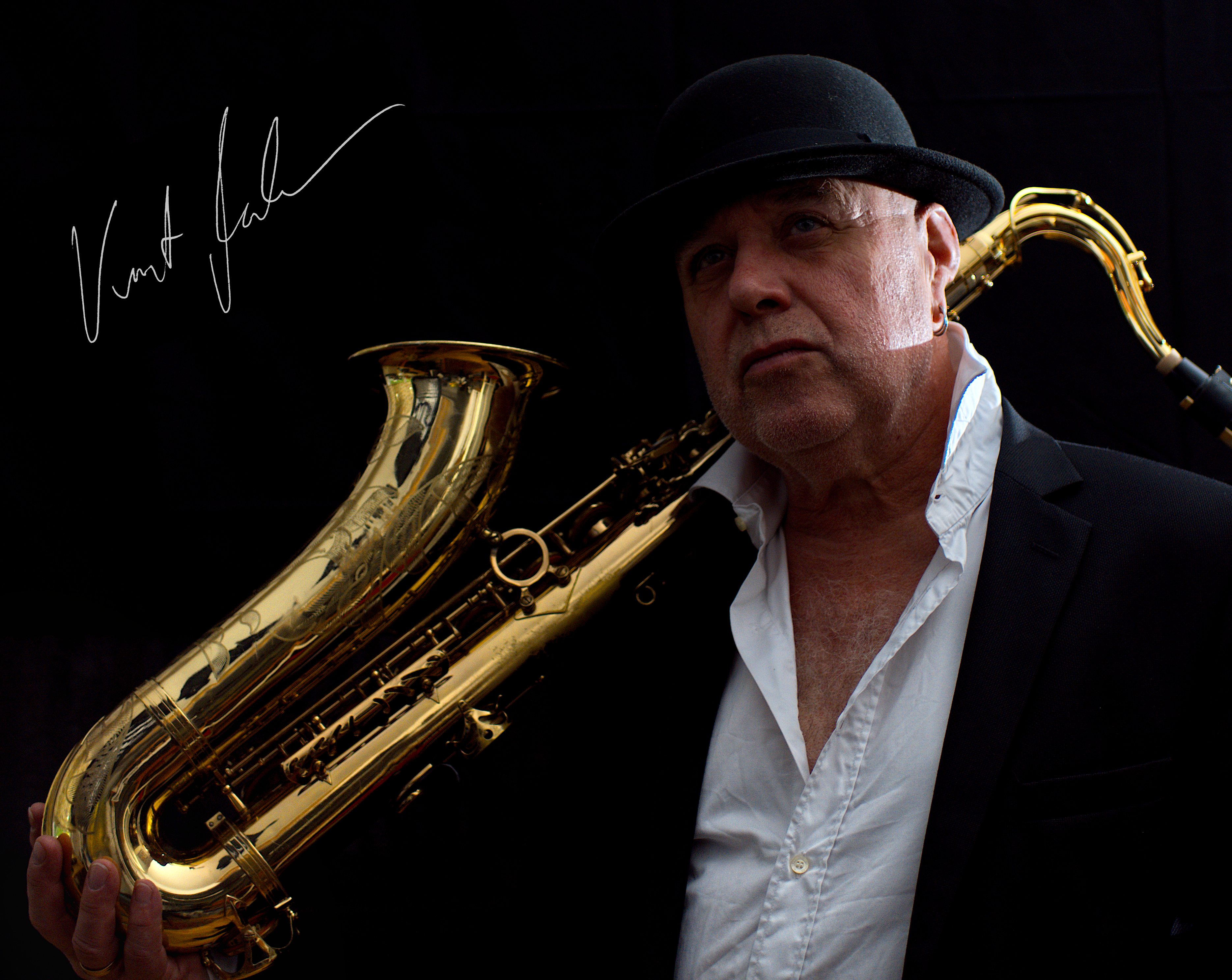 Porträt - Kurt Buschmann - 2019